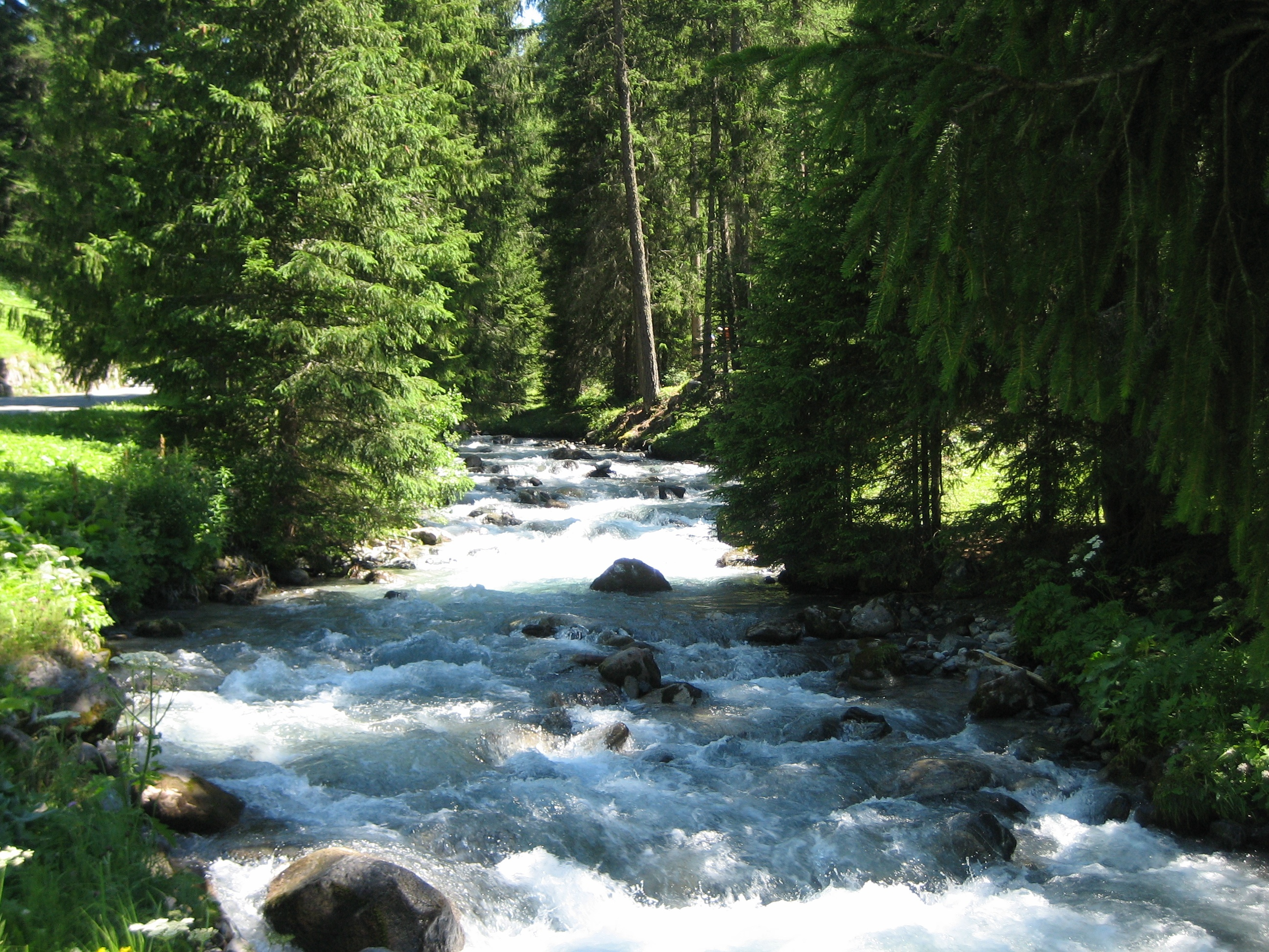 Im Sertig